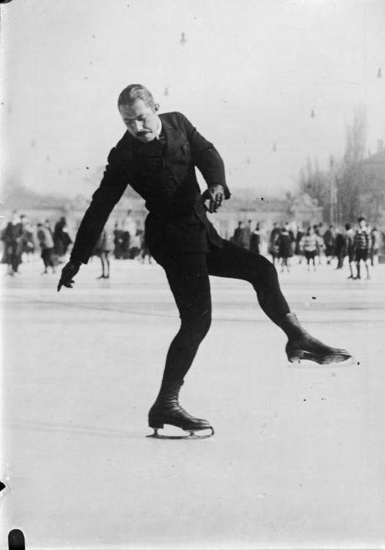 Der Wiener Eislaufmeister Böckl zum vierten Mal Weltmeister. Der Weltmeister Ing. Willy Böckl, Wien, beim Ausführen einer seiner schwierigen Figuren.